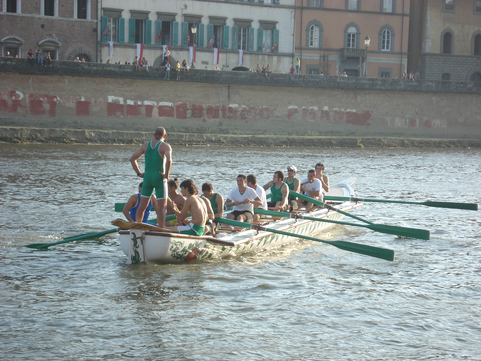 Alla conclusione della gara, la barca bianca e verde del quartiere Sant'Antonio, procede verso l'approdo. 17 giugno 2009, Palio di San Ranieri, Pisa.